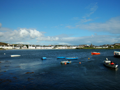 艾拉島上的愛倫港一景 愛倫港（Port Ellen）是zh:艾拉島與zh:蘇格蘭本土航運交通的主要港口之一，港邊也有因為交通、漁業與造酒業而興盛起的小型聚落。 本圖片由上傳者zh:User:SElephant拍攝於2004年8月。